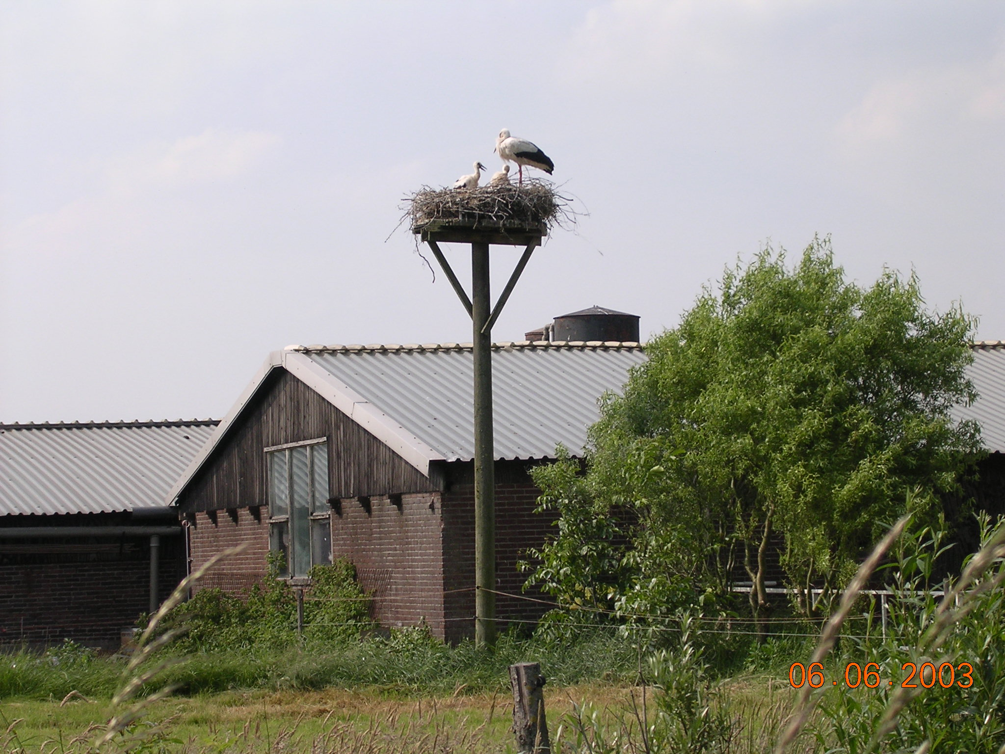 Ooievaarsdorp in Zegveld. Foto gemaakt in 2003 door Edo de Roo. Foto is vrij van rechten.